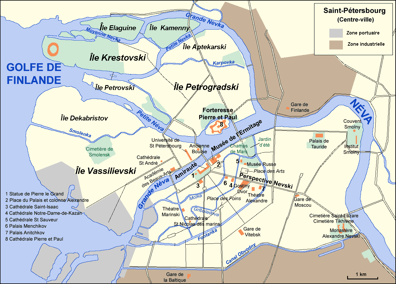 Carte du centre ville de Saint Petersbourg